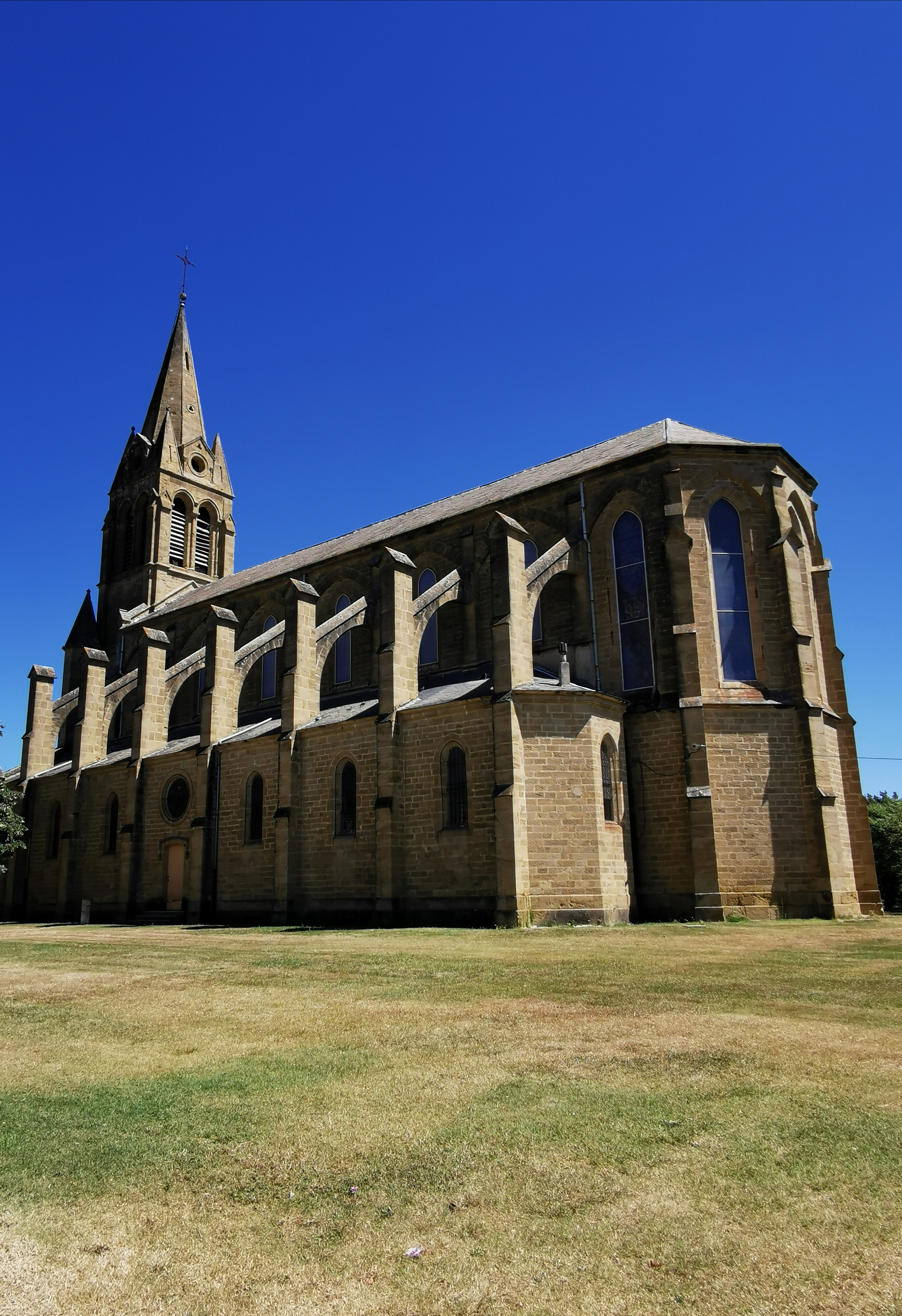 Vue de l'arrière de Notre-Dame de Plaisance, juillet 2020